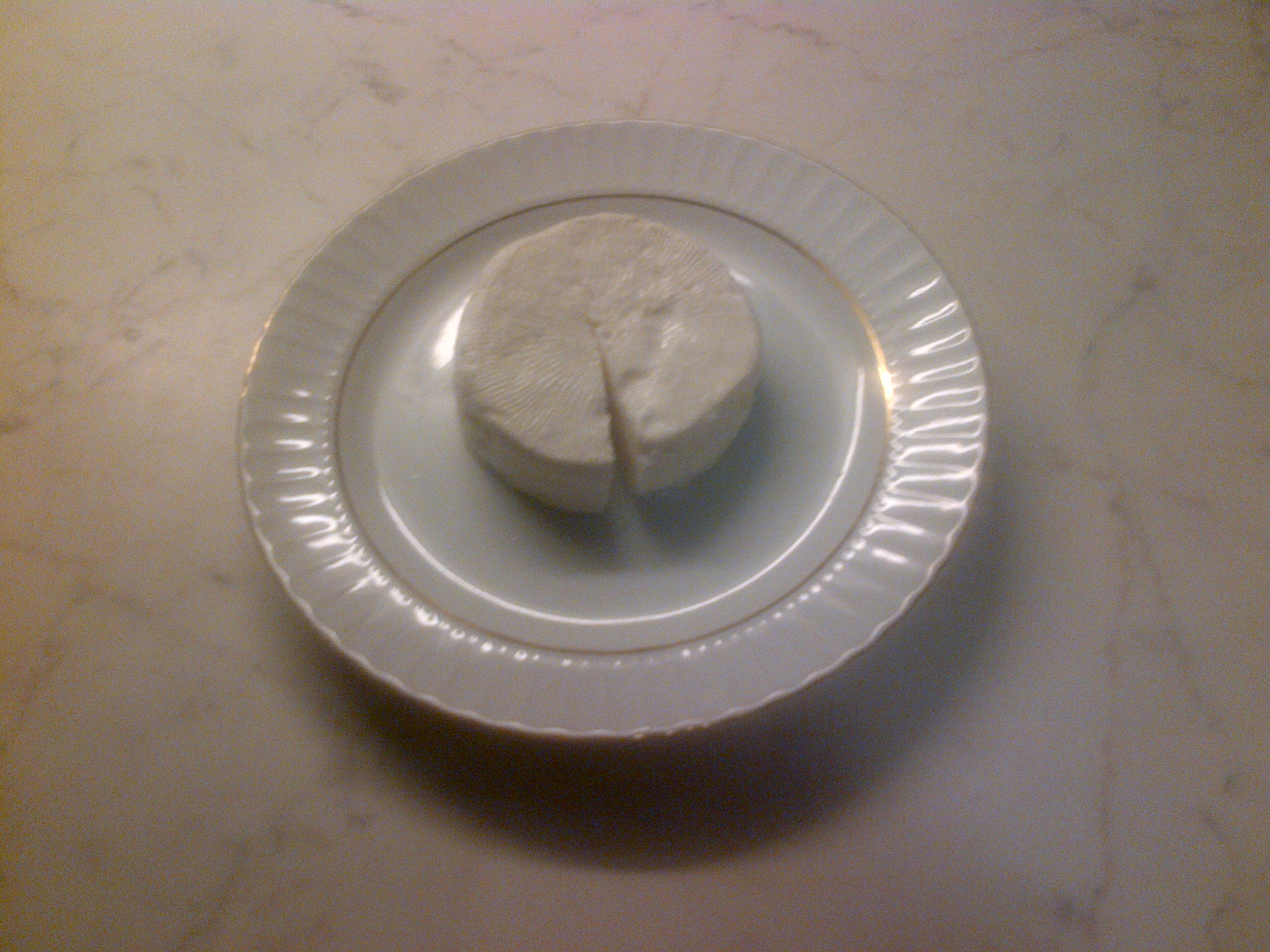 Formatge blanc turc (beyaz peynir)